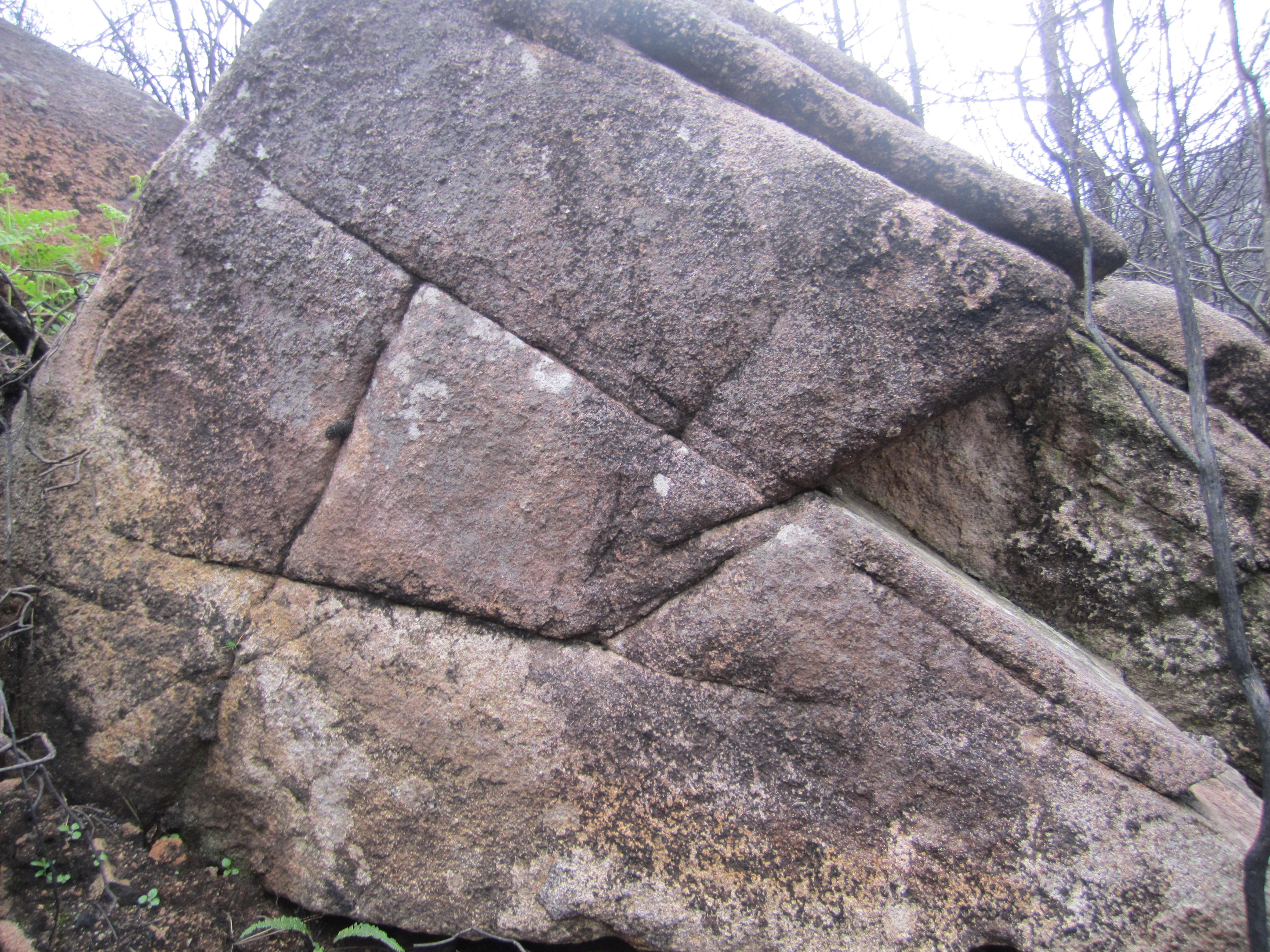 Bolo granítico no Monte Pindo